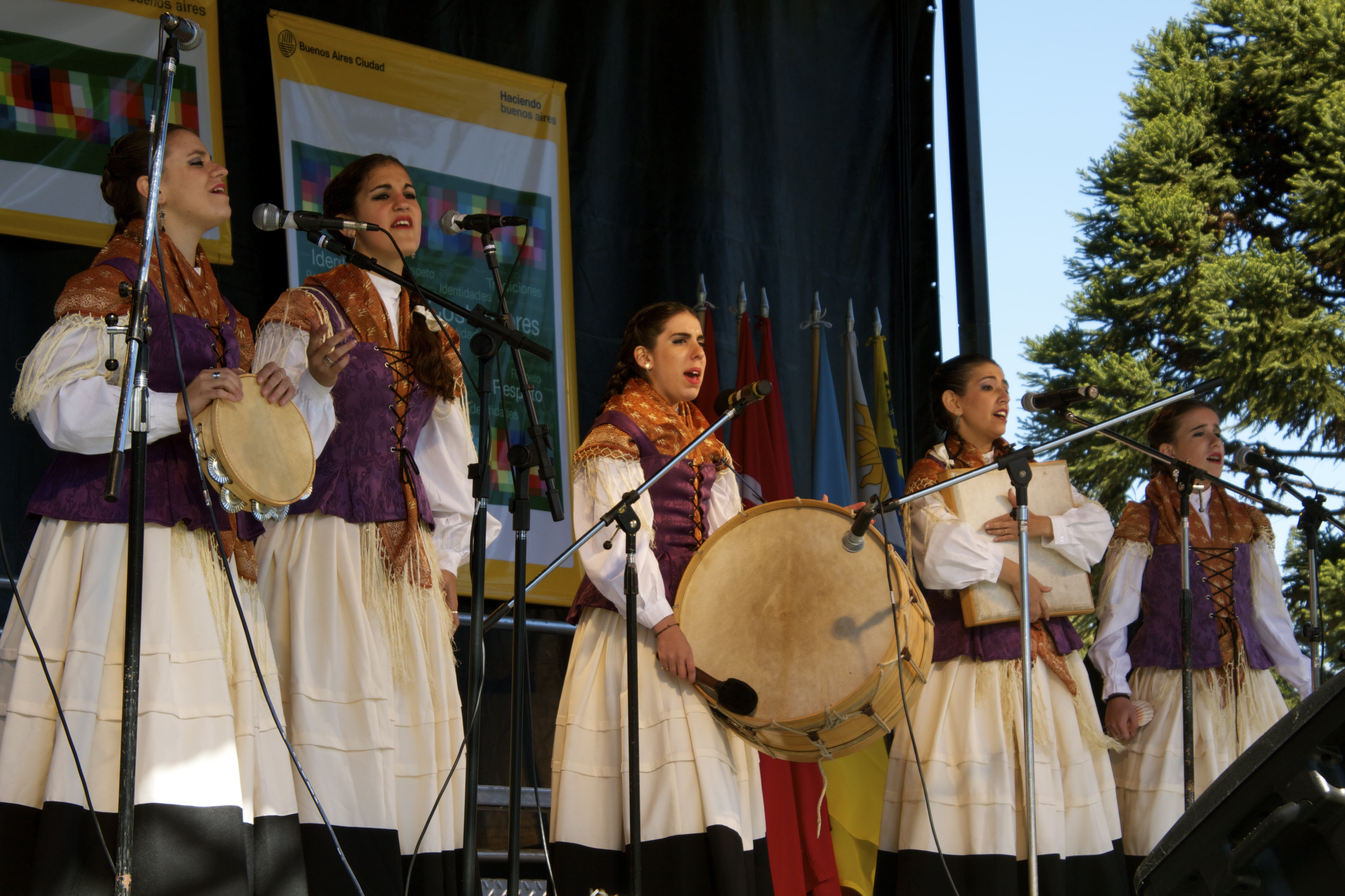 Dia del Inmigrante 2010 20